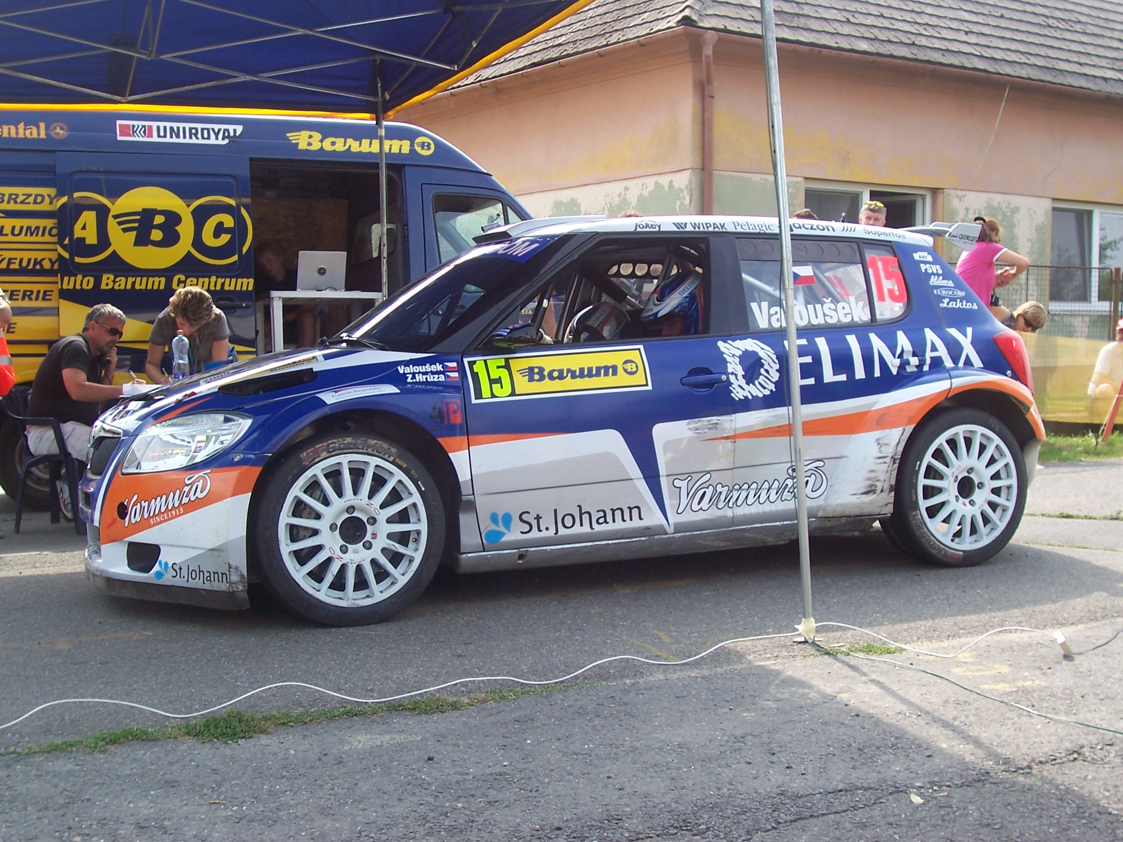 Pavel Valoušek RZ Kudlovice (Barum Czech Rally Zlín 2009)